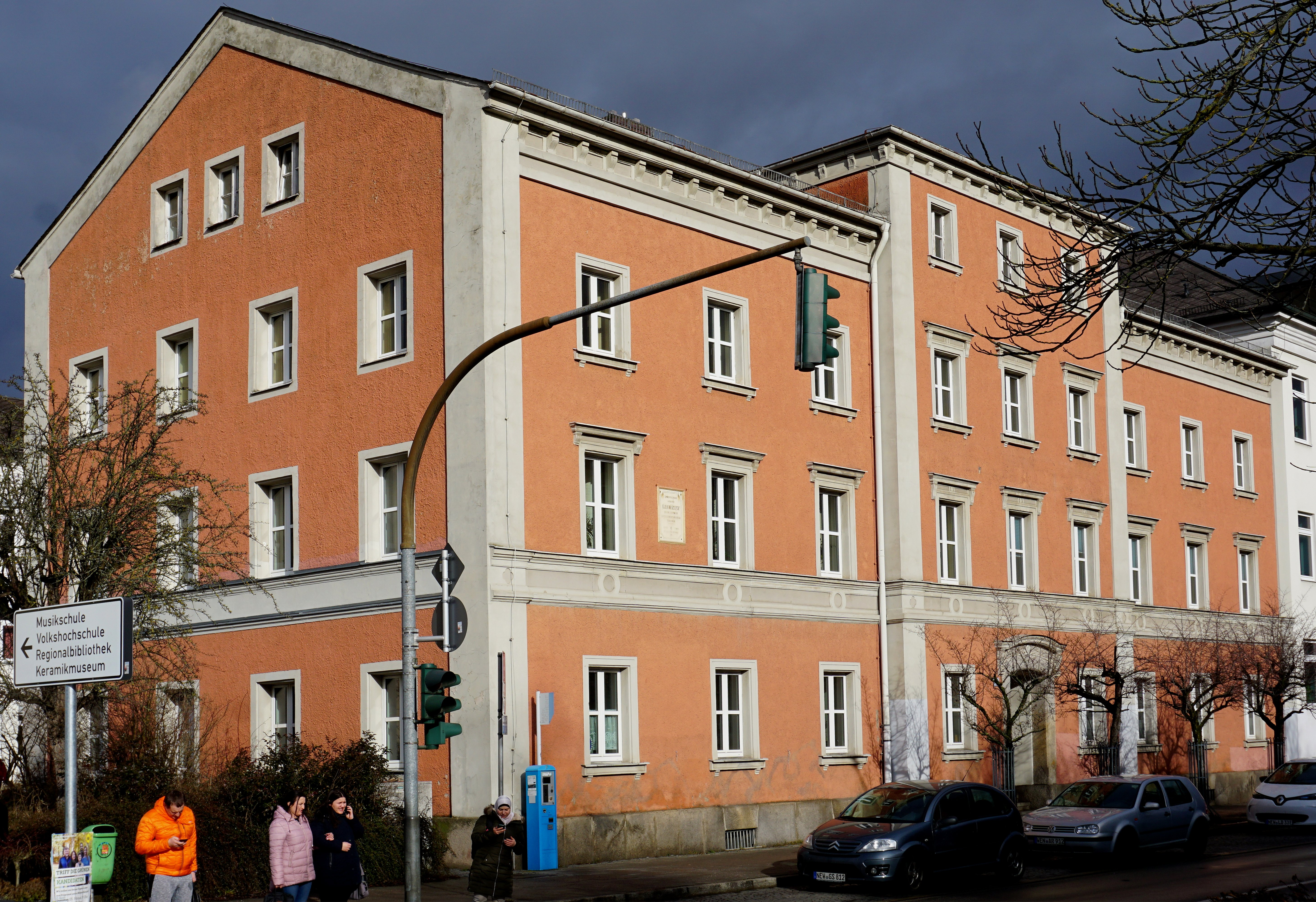 Ehemaliges Beamten-Wohnhaus. Von 1878–1901 Wohnhaus von Max Reger, dreigeschossiger, verputzter Massivbau mit Satteldach, um ein Halbgeschoss erhöhtem Mittelbau und klassizistischer Fassadengestaltung, 1870–1871. This is a photograph of an architectural monument.